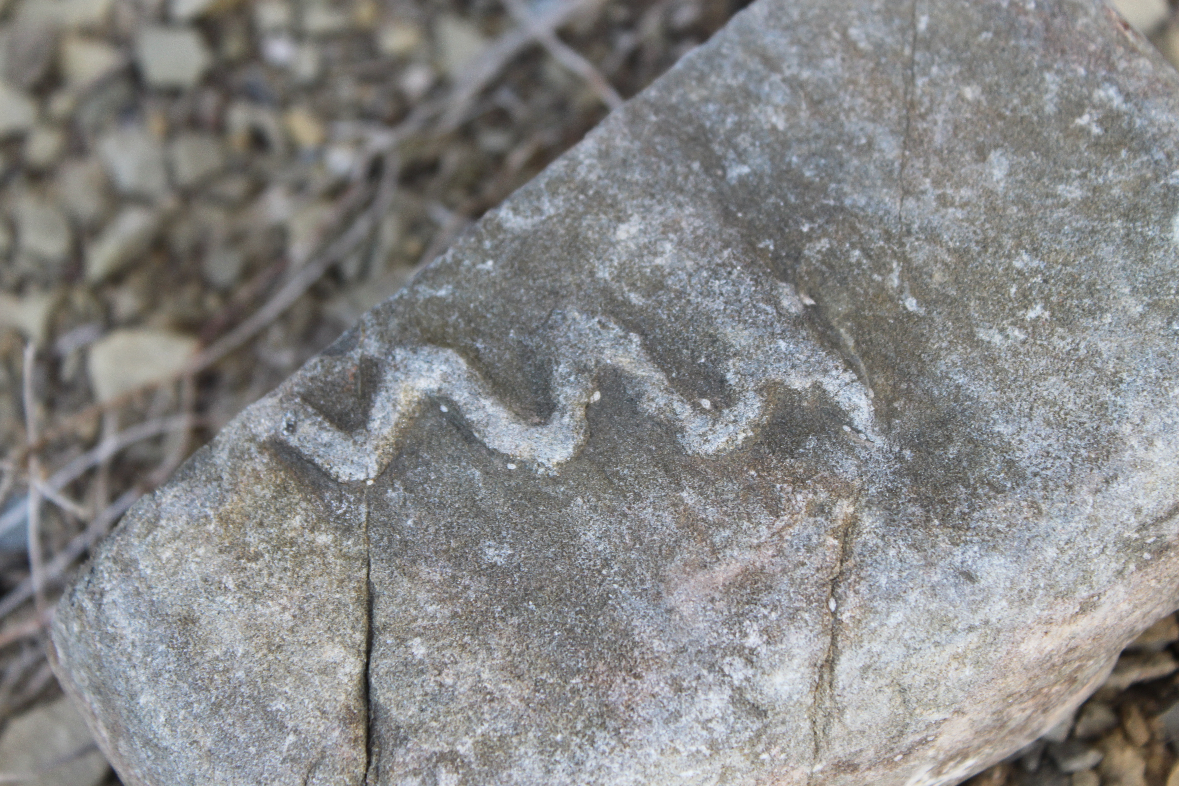 Icnofósil Belorhaphe (Fuchs, 1895) en arenisca de los flyschs de punta San García. Complejos del Campo de Gibraltar, Unidad de Algeciras (Oligoceno-Mioceno). Algeciras, Andalucía, España.